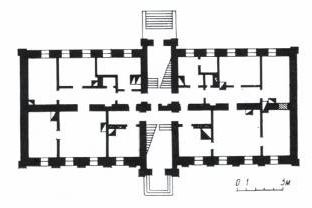 БДСГА. Прафесарскі корпус. План першага паверха.